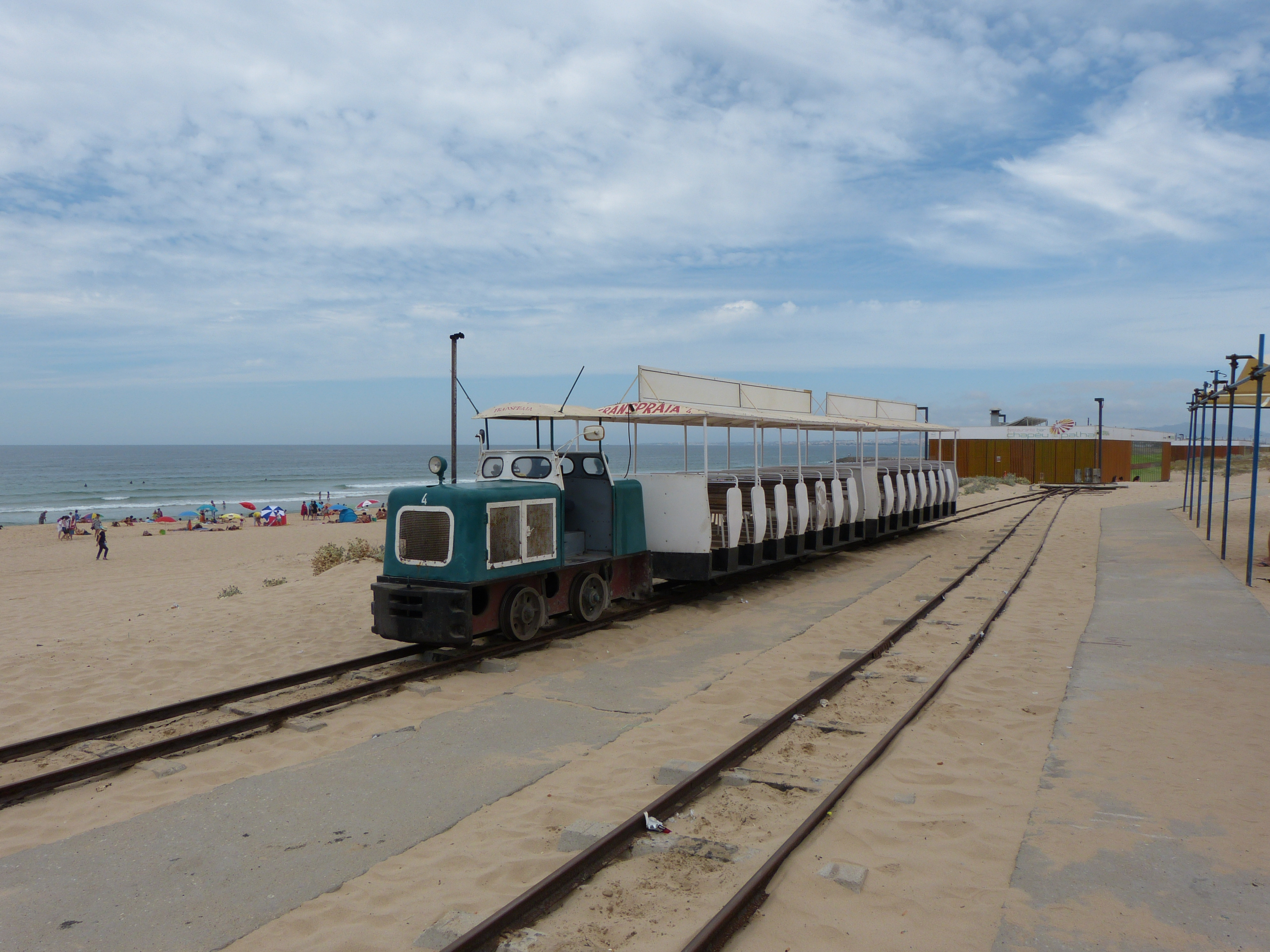 Strandbahn bei Costa da Caparica, südlich von Lissabon, Portugal